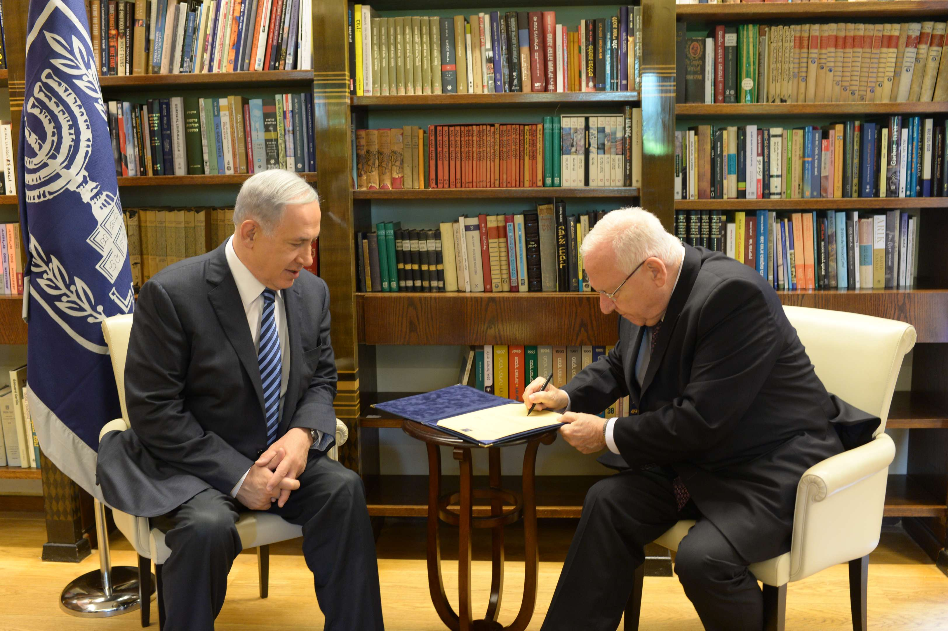 נשיא מדינת ישראל ראובן ריבלין נותן הארכת זמן של 14 יום לבנימין נתניהו להרכיב את הממשלה ה-34